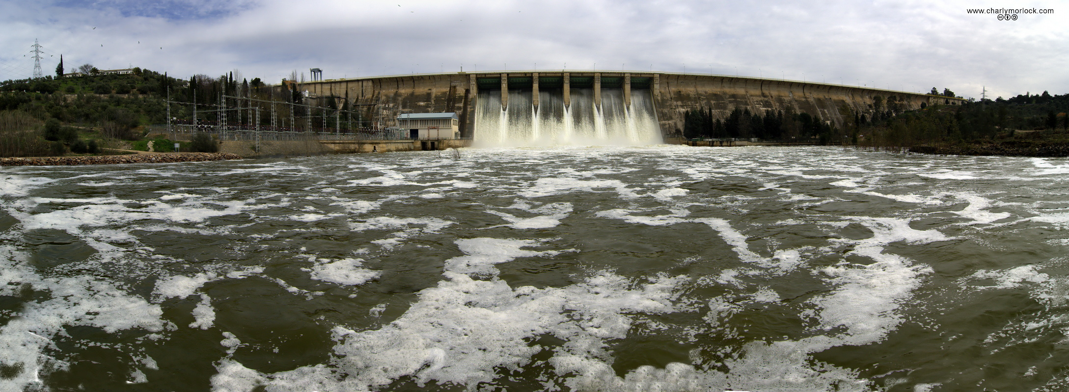 Desembalse del embalse de Orellana